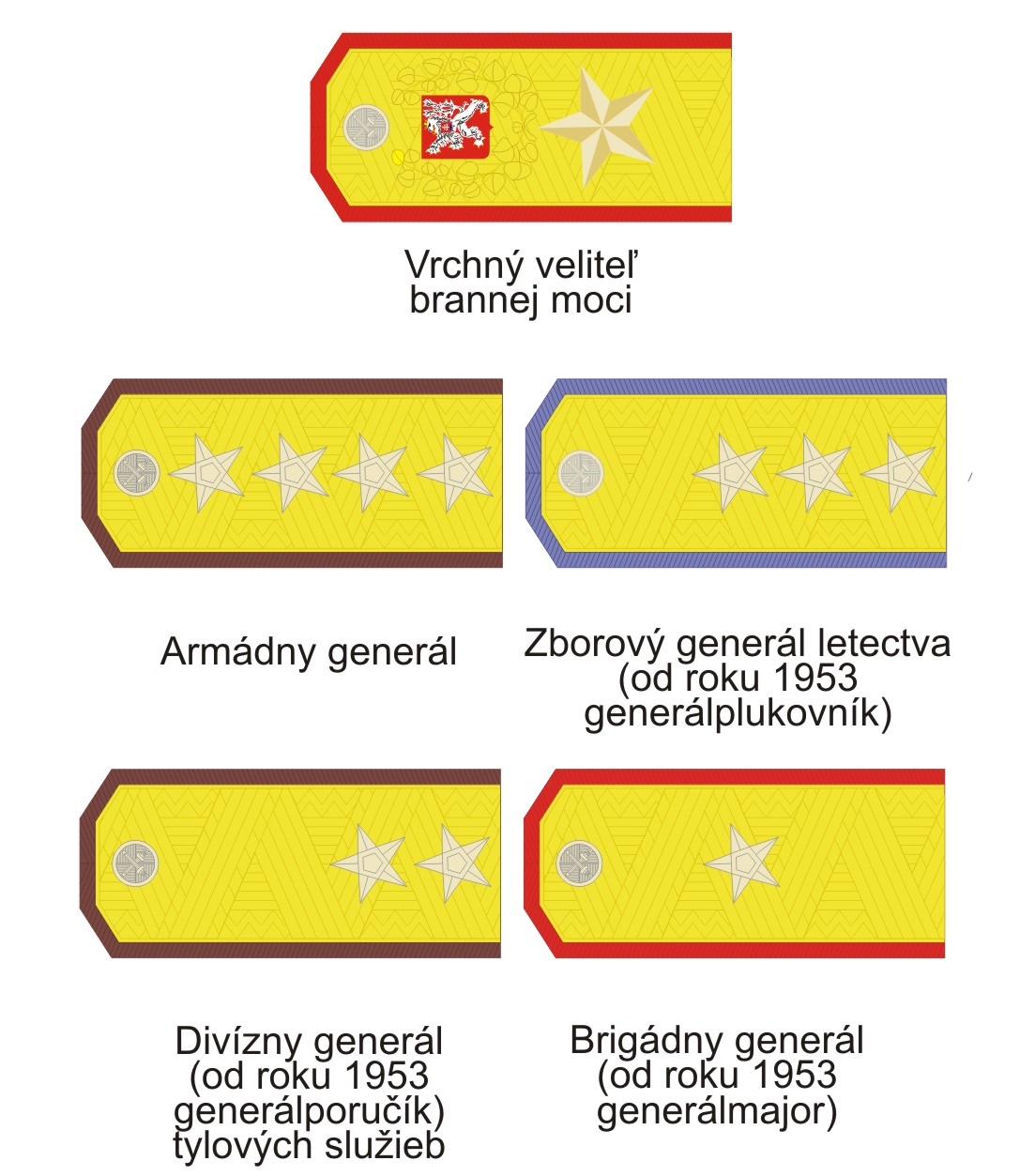 Vojenské hodnostné označenie generálov Česko-Slovenskej armády v rokoch 1951 až 1957